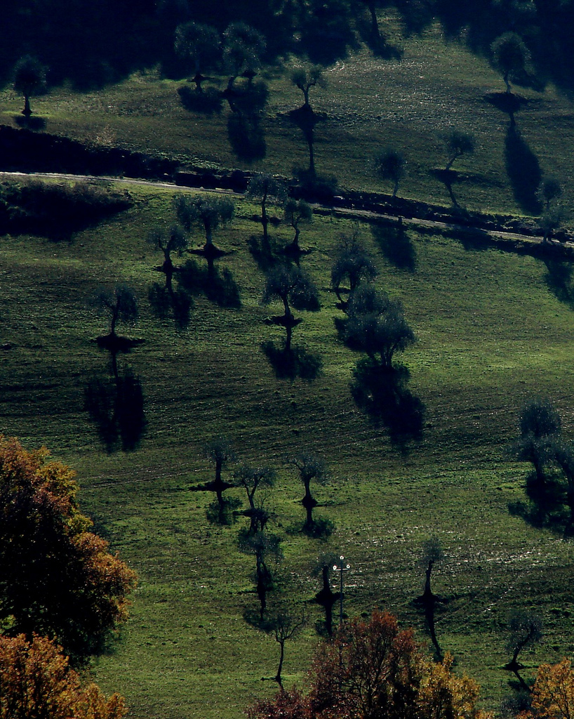 Nei pressi di Bagnoregio (VT)